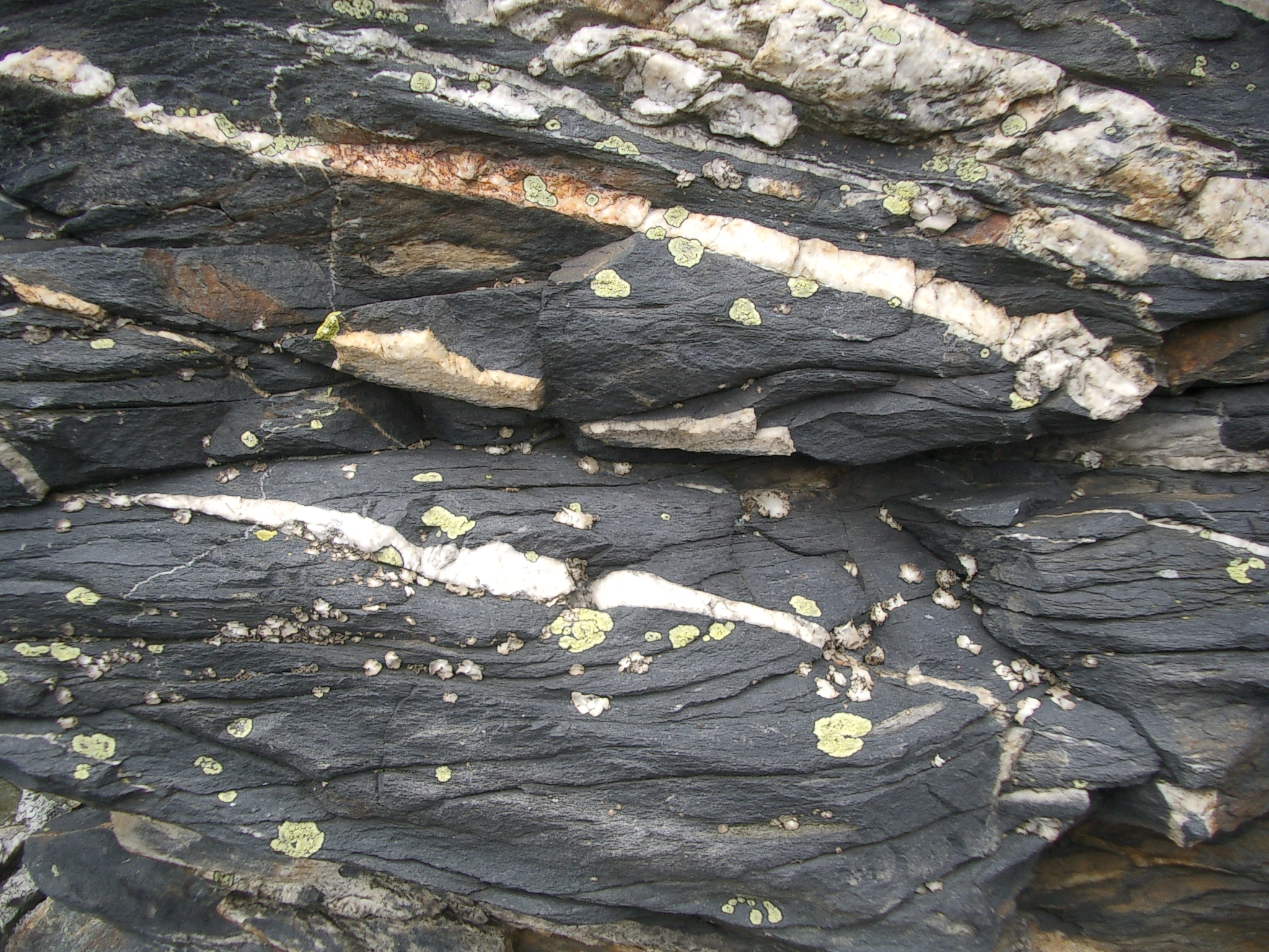 Hoher Stein Quarzit, Vysoký kámen